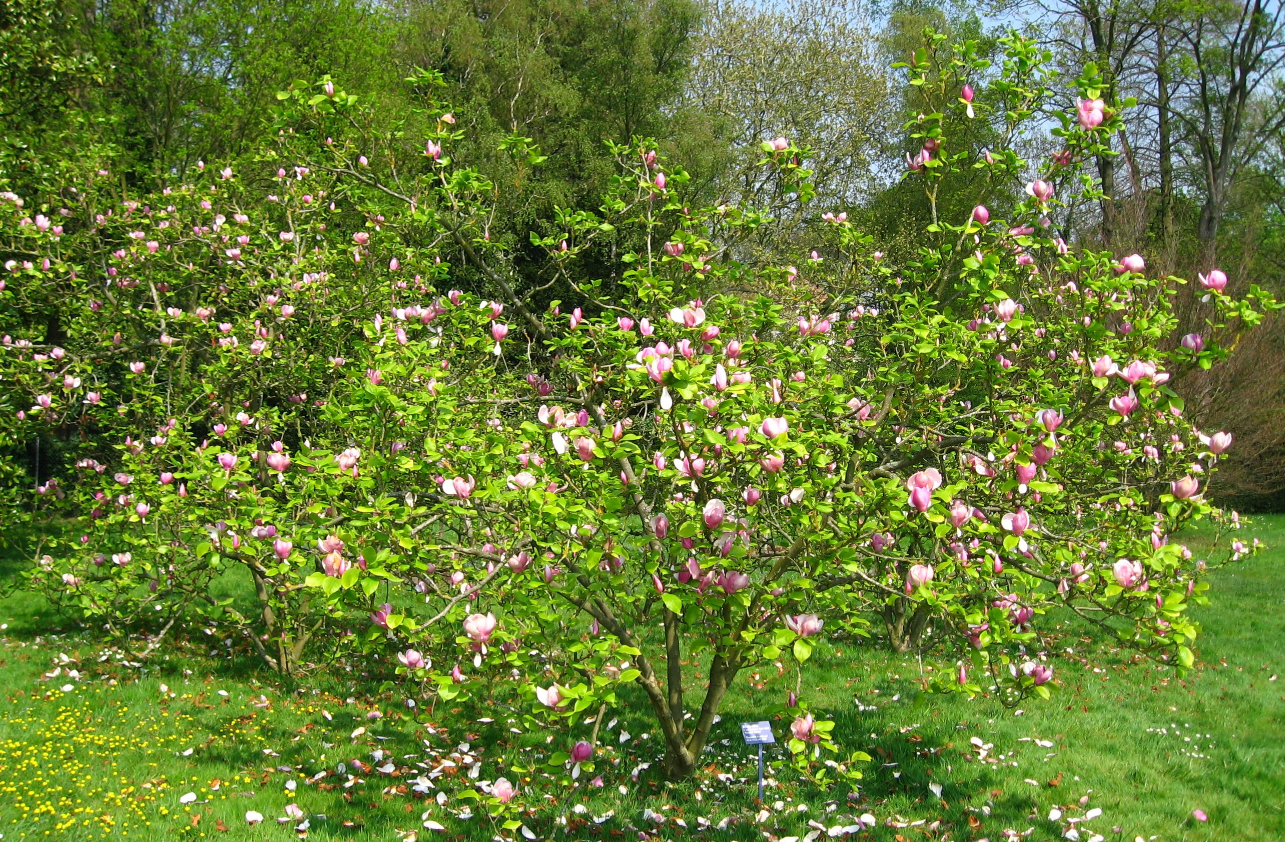 Magnolia × soulangeana 'Rustica Rubra' Thiéb.-Bern. in Arboretum de la Vallée-aux-Loups. Map: 48° 46' 22" N 2° 16' 5" E